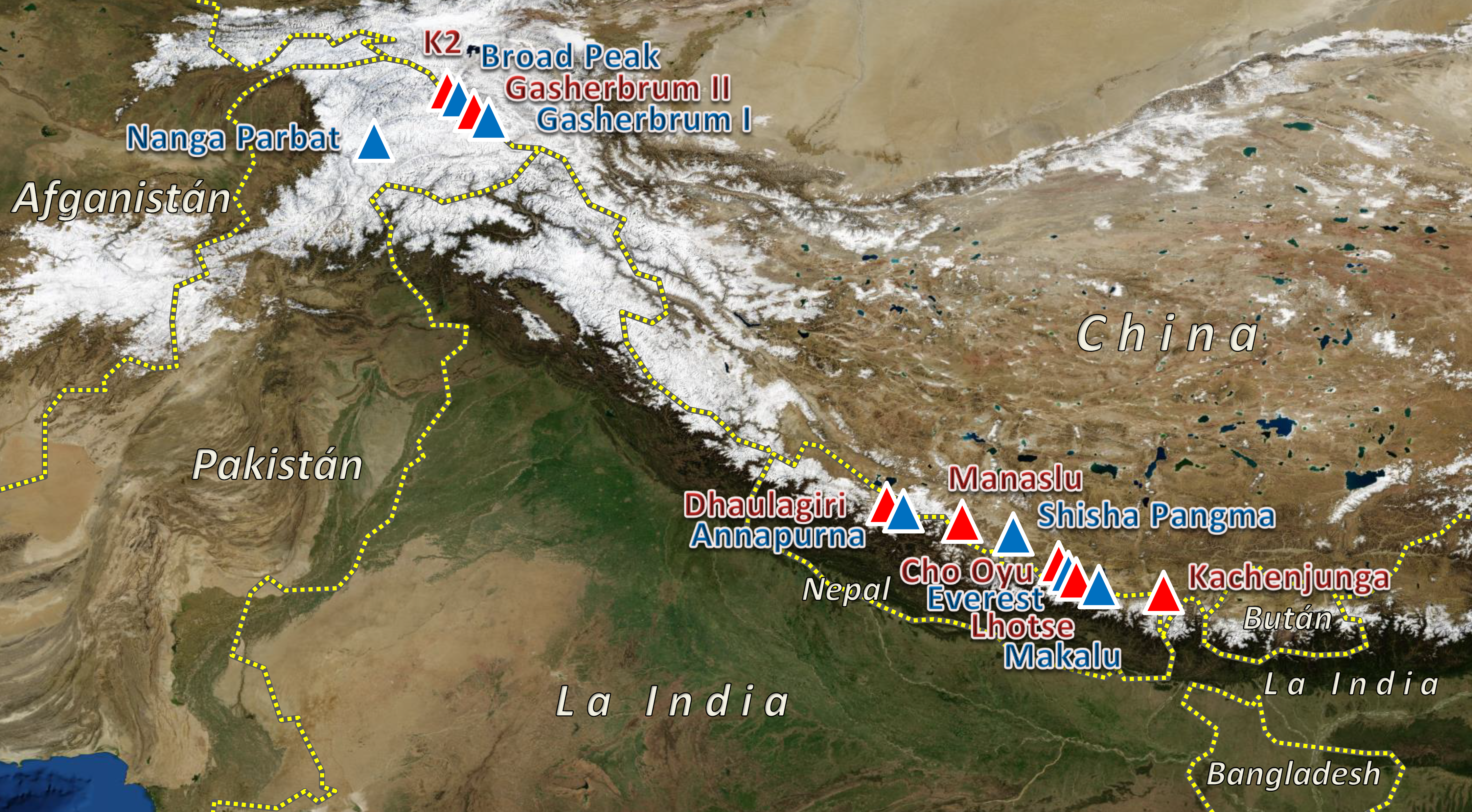 Posición de los "catorce ochomiles" en el sistema montañoso formado por el Karakorum (con cinco de las catorce cumbres) y el Himalaya (con las nueve restantes)